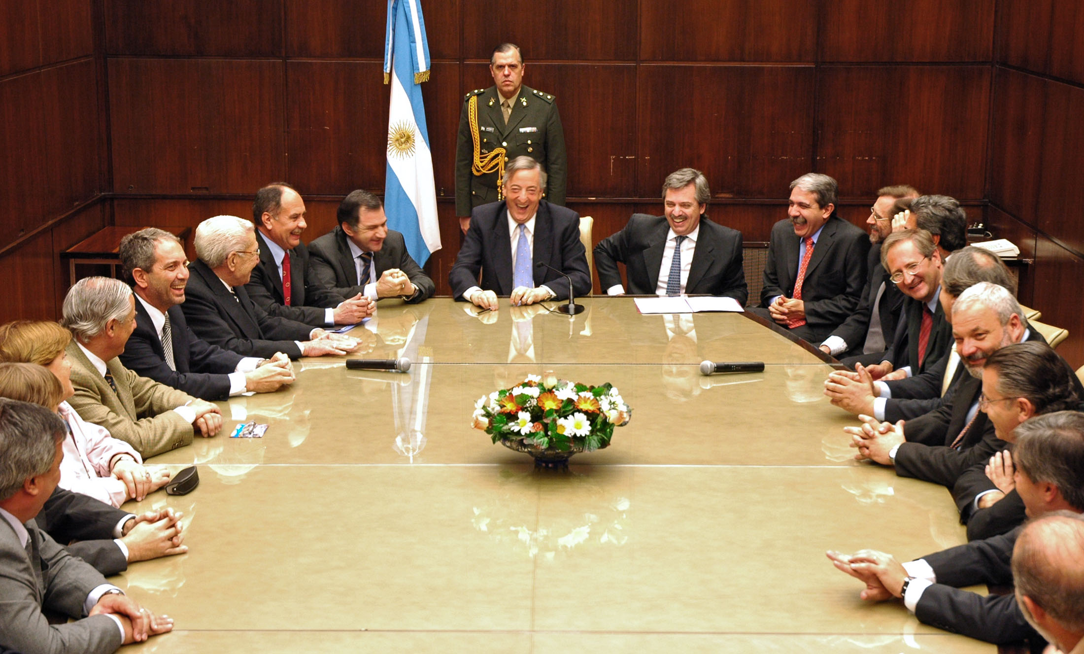 Casa Rosada, Sala de Situación - El presidente Néstor Kirchner,junto al jefe de Gabinete, Alberto Fernández, y al ministro Aníbal Fernández, se reunió con intendentes de municipios de la provincia de Buenos Aires.